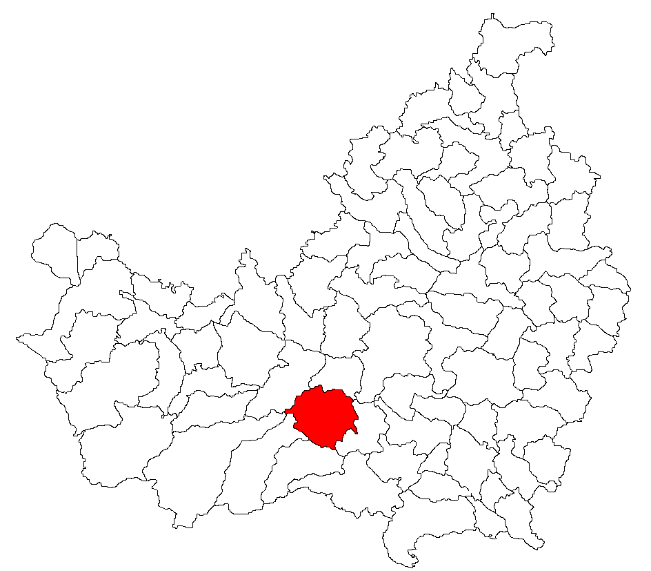 Categorie:Hărţi ale judeţului Cluj